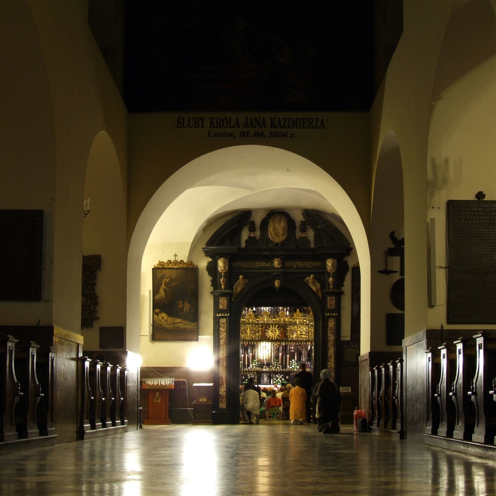 Kaplica Cudownego Obrazu, Jasna Góra. Nawa główna